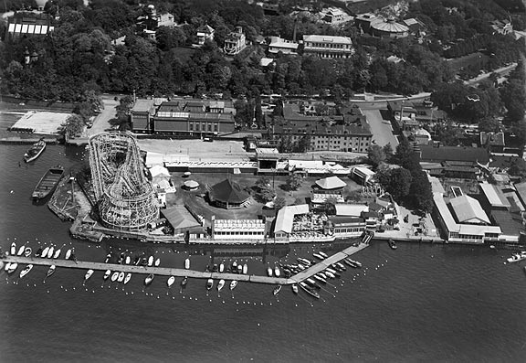 Nöjesfältet på Djurgården